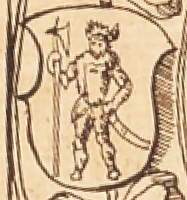 Герб Трокского воеводства из польского издания Статута Великого княжества Литовского 1588 года, изданного в 1614 году.